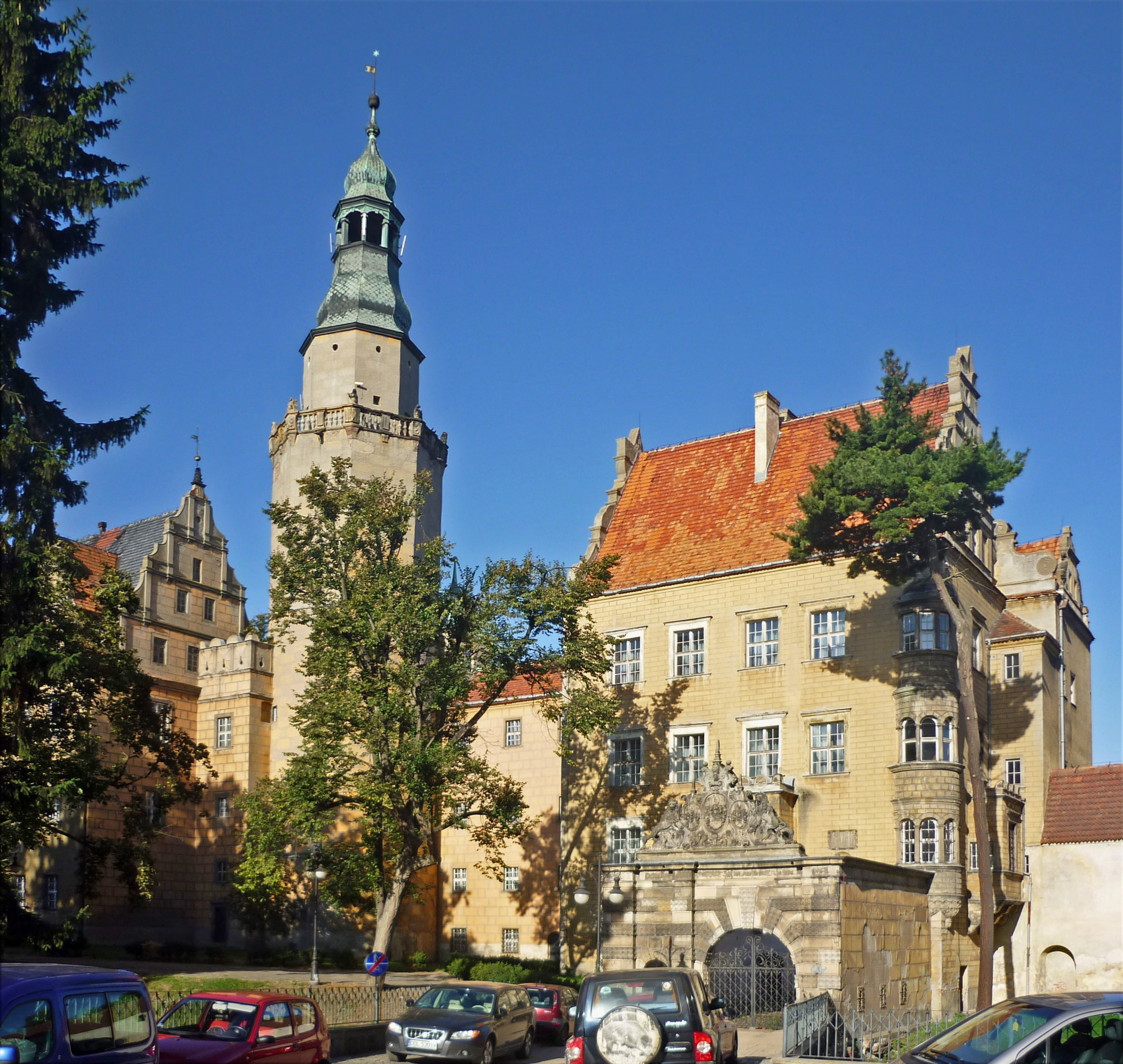 Piastenschloss in Oels/Oleśnica in Niederschlesien